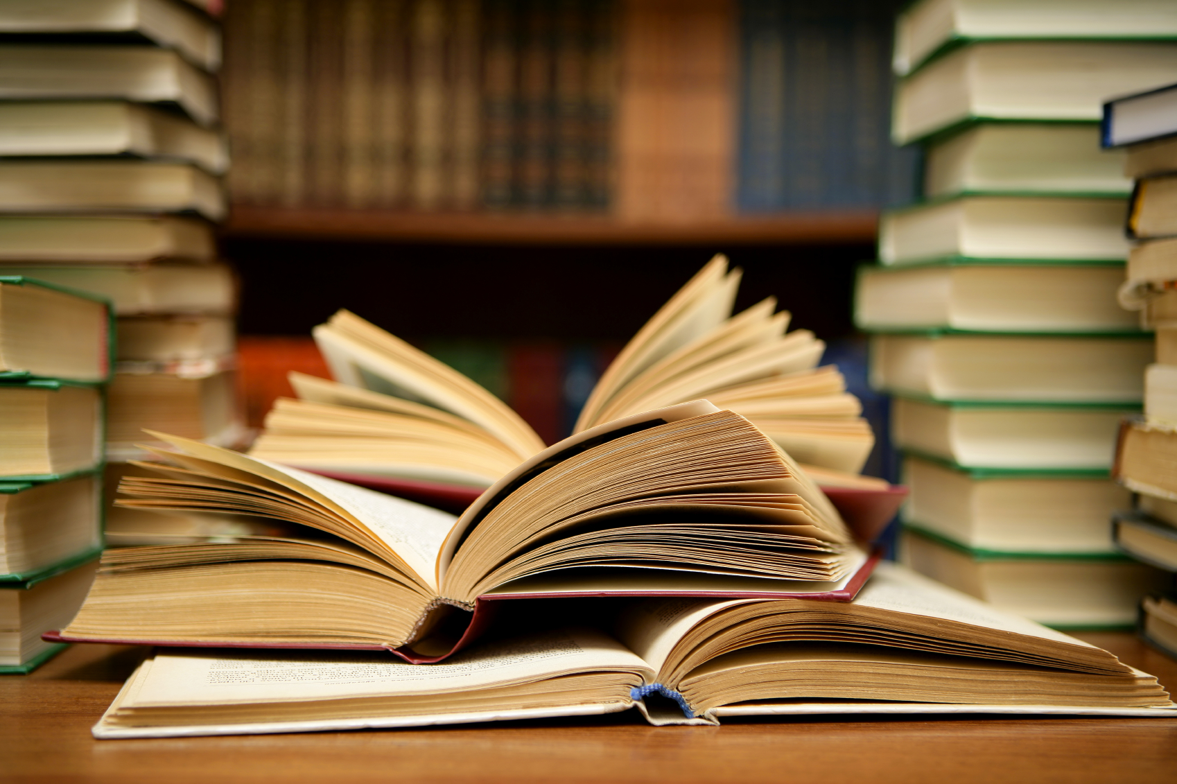 Books HD Books on Library